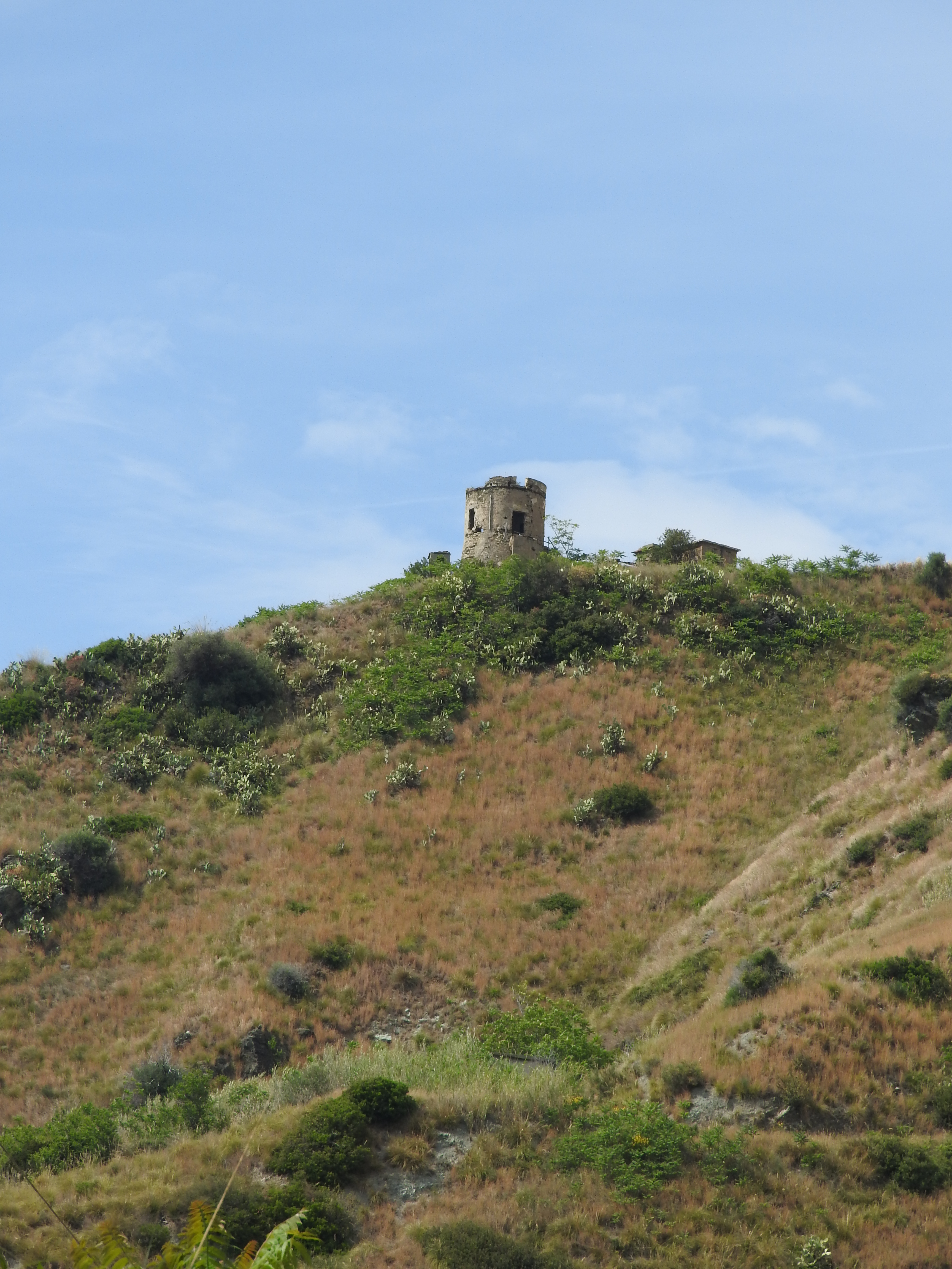 La torre arabo-normanna di Coreca, vista dalla Piazza del borgo.